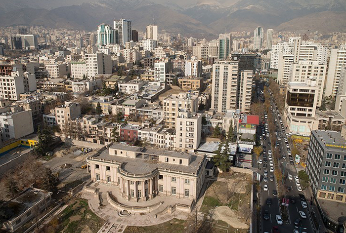 بزرگترین خانه تاریخی تهران متعلق به حبیب‌الله ثابت‌پاسال با وسعت بیش از ۱۱ هزار مترمربع در خیابان جردن که به "کاخ ثابت پاسال" شناخته می‌شود در حال تخریب است.